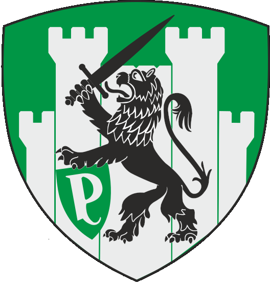 Wappen des estnischen Pionierbataillon